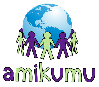 Emblemo de Amikumu Kategorio:Eksaj Esperanto-retejoj